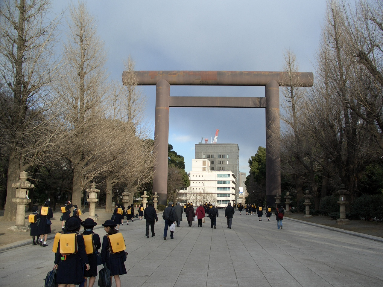 Yasukuni Shrine Tori Gate Tokyo, Japan